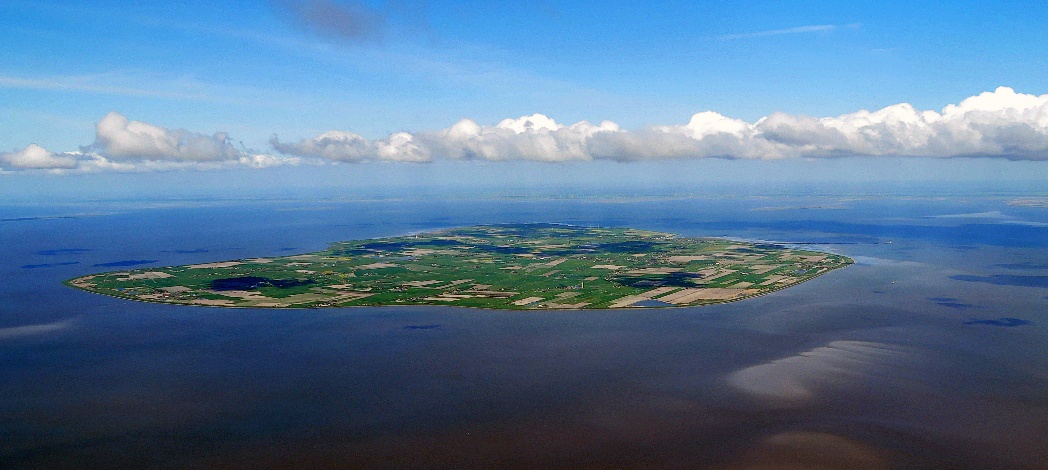 Luftbilder von der Nordseeküste 2012-04: Pellworm